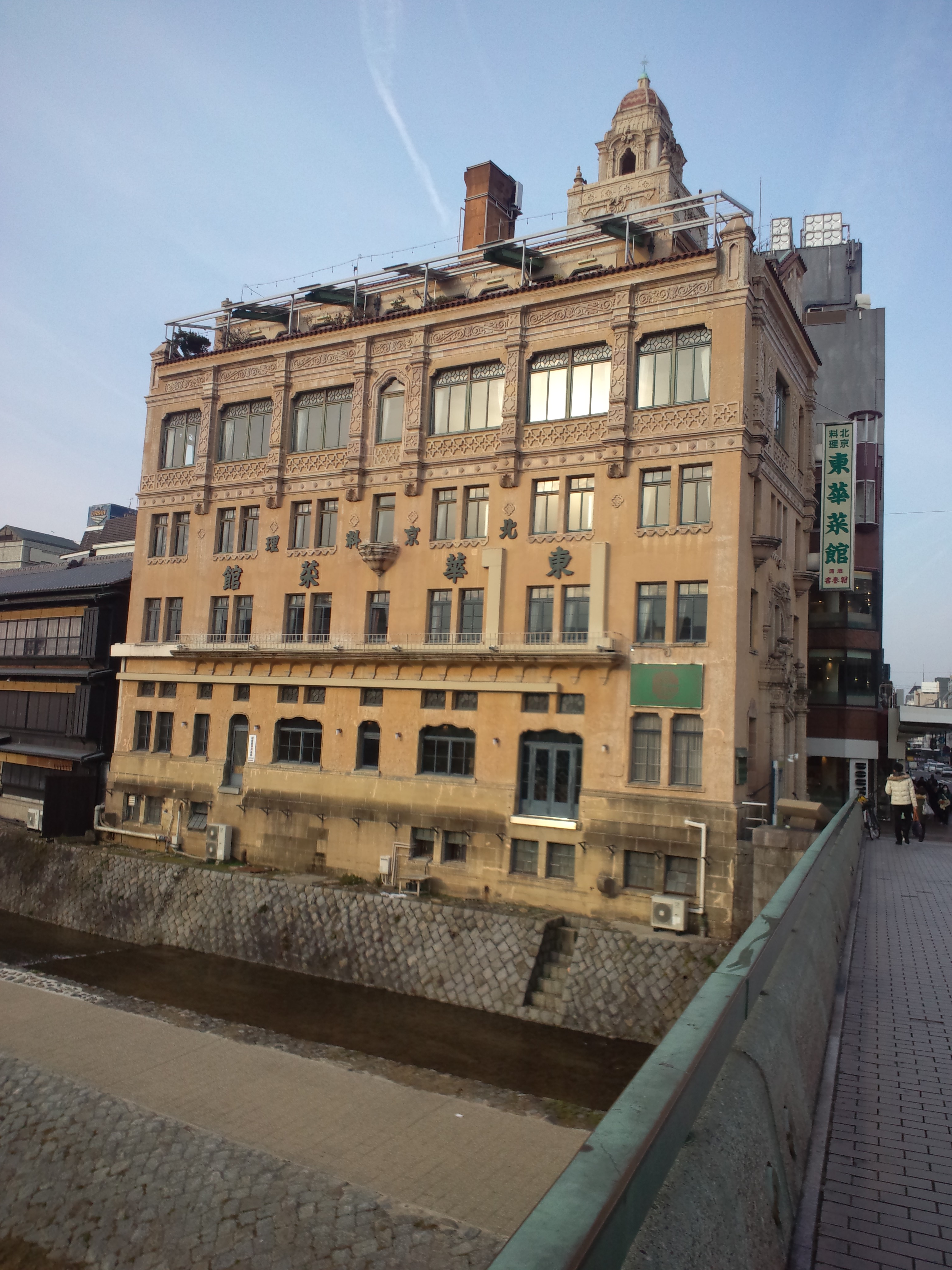 北京料理 東華菜館 本店